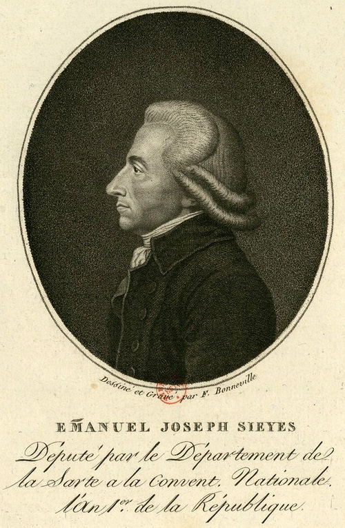 Em[m]anuel Joseph Sieyes : deputé par le département de la Sarte a la Convent. nationale l'an 1.er de la République (estampe)